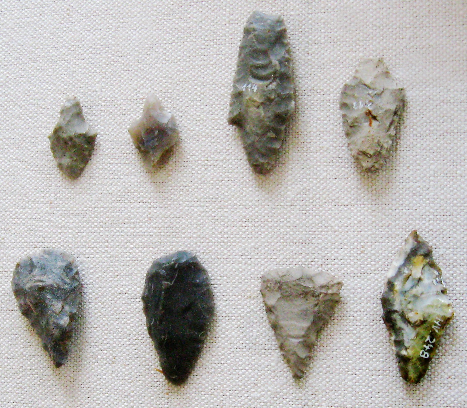 Pfeilspitzen im Museum Pachten